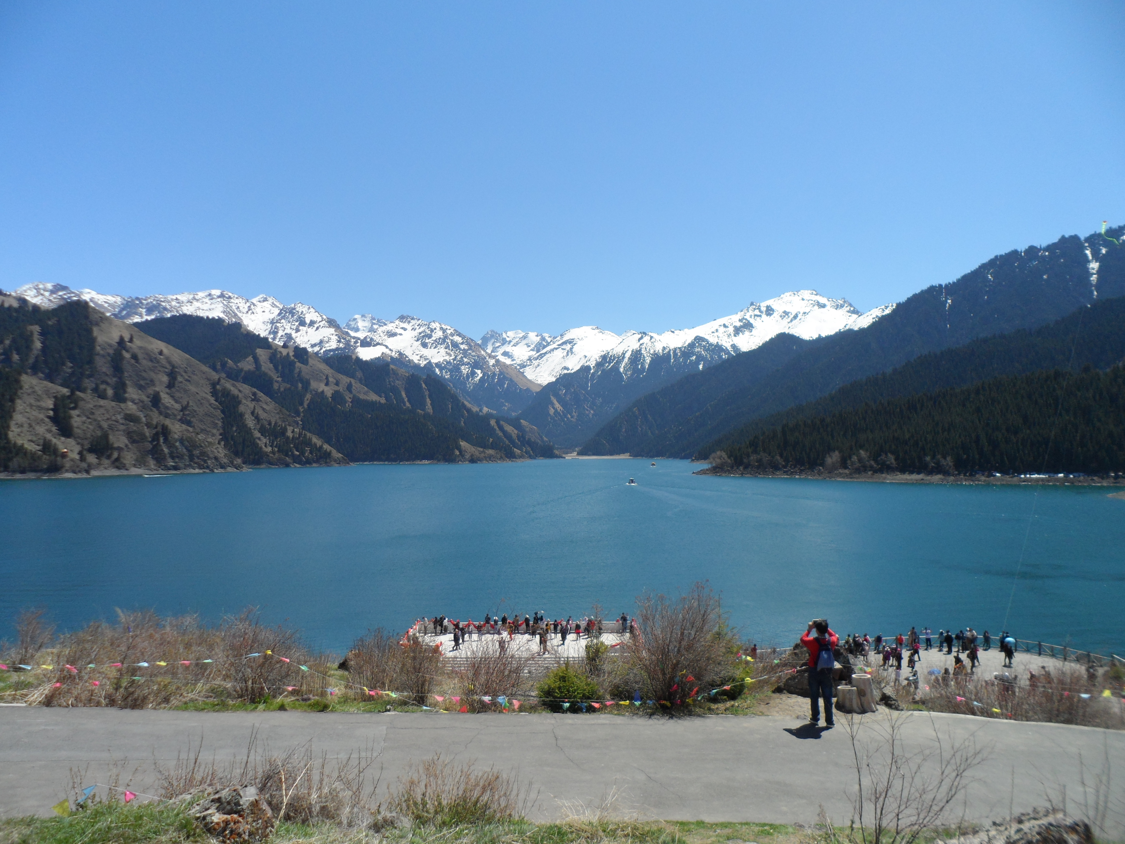 Tianchi Lake of Tian Shan